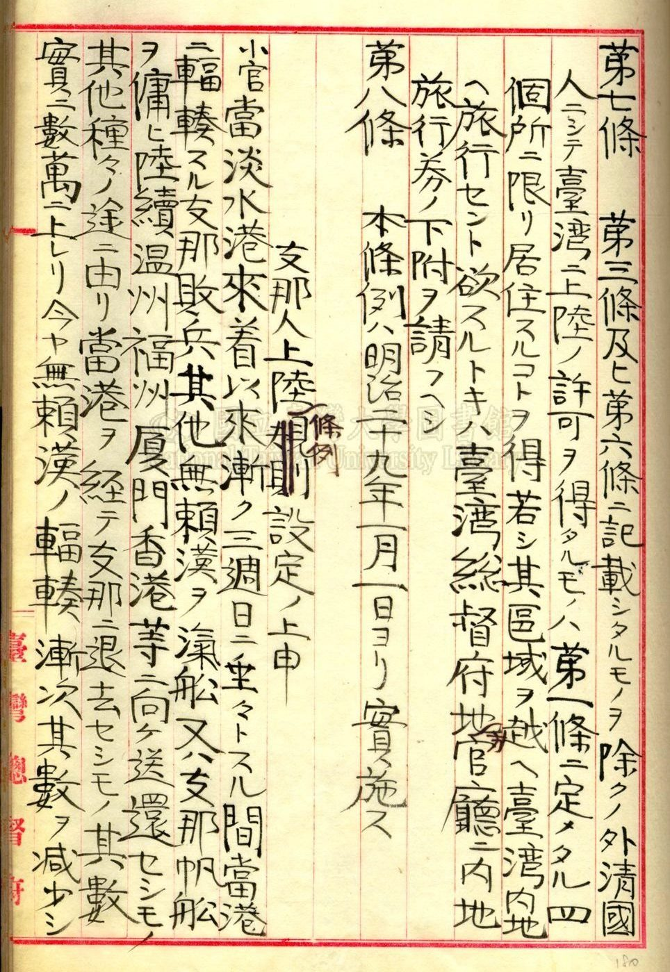 明治28年6月29曰